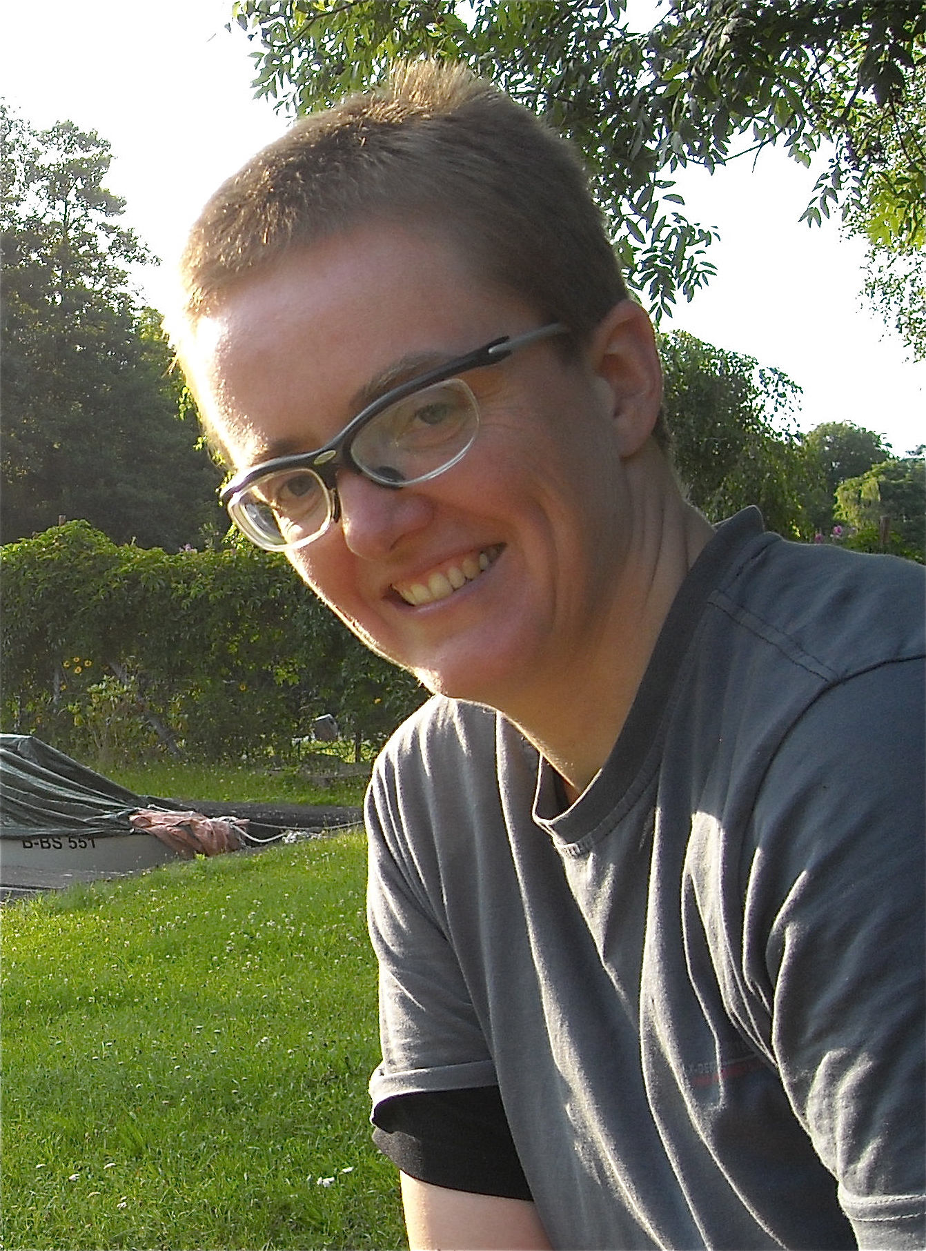 Katja Cronauer, Schriftstellerin und Digitalkünstlerin